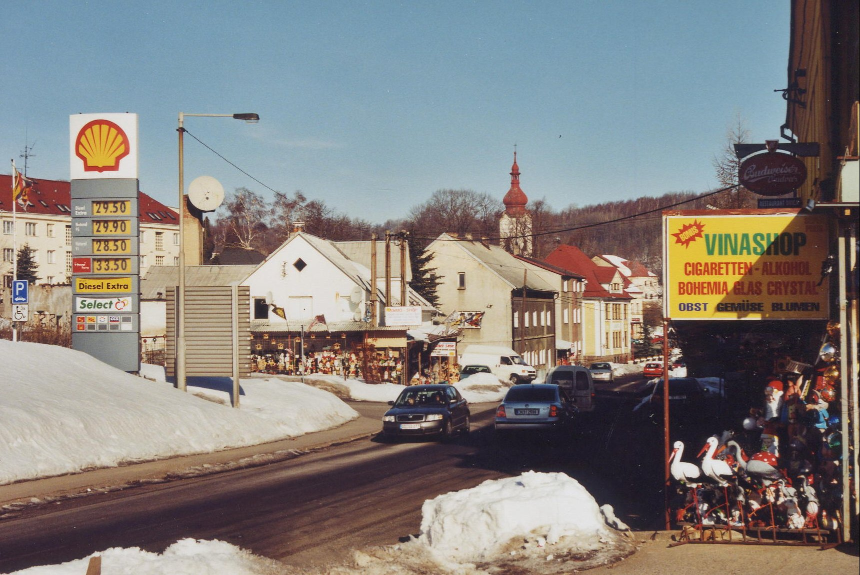 Petrovice u Chabařovic (Peterswald): Hauptstraße im oberen Ortsteil